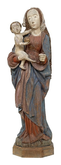 Panna Marie s Ježíškem ze Skalné (třetí čtvrtina 15. stol.)